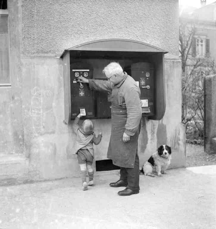 Mann und Kind bei Briefmarkenautomat und Briefkasten. Foto: Auftrag Postdirektion (Schweiz)